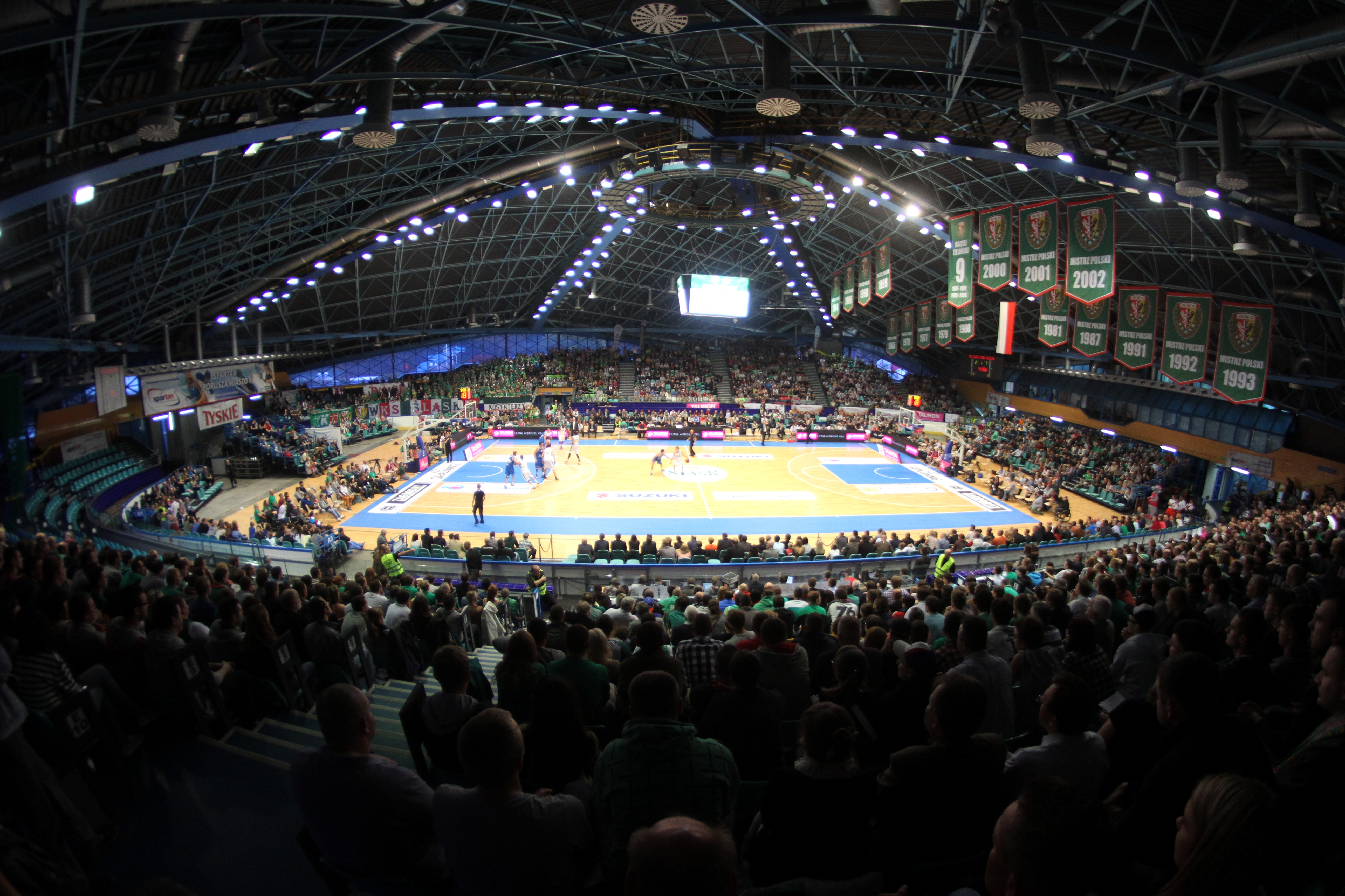 Intermarche Basket Cup, Puchar Polski, hala Orbita, Wrocław